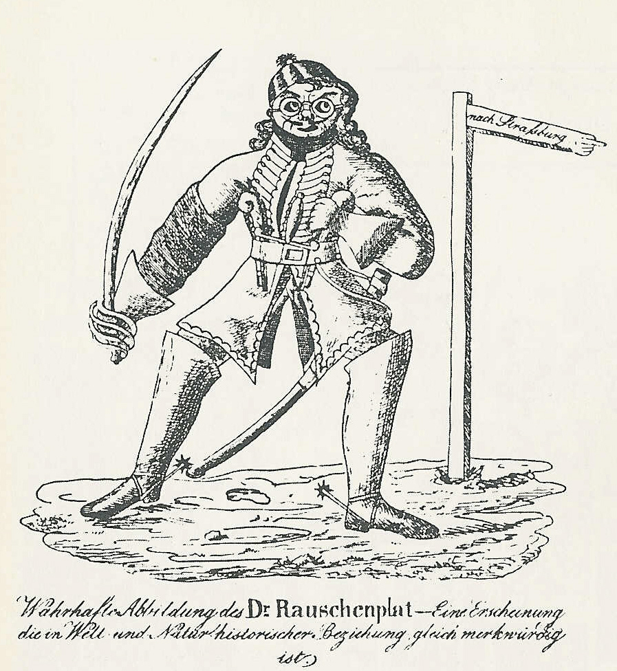 „Wahrhafte Abbildung des Dr. Rauschenplat – Eine Erscheinung die in Welt und Natur historischer Beziehung gleich merkwürdig ist.“ Anonymer Kupferstich von 1831, Rechte abgelaufen, Public Domain